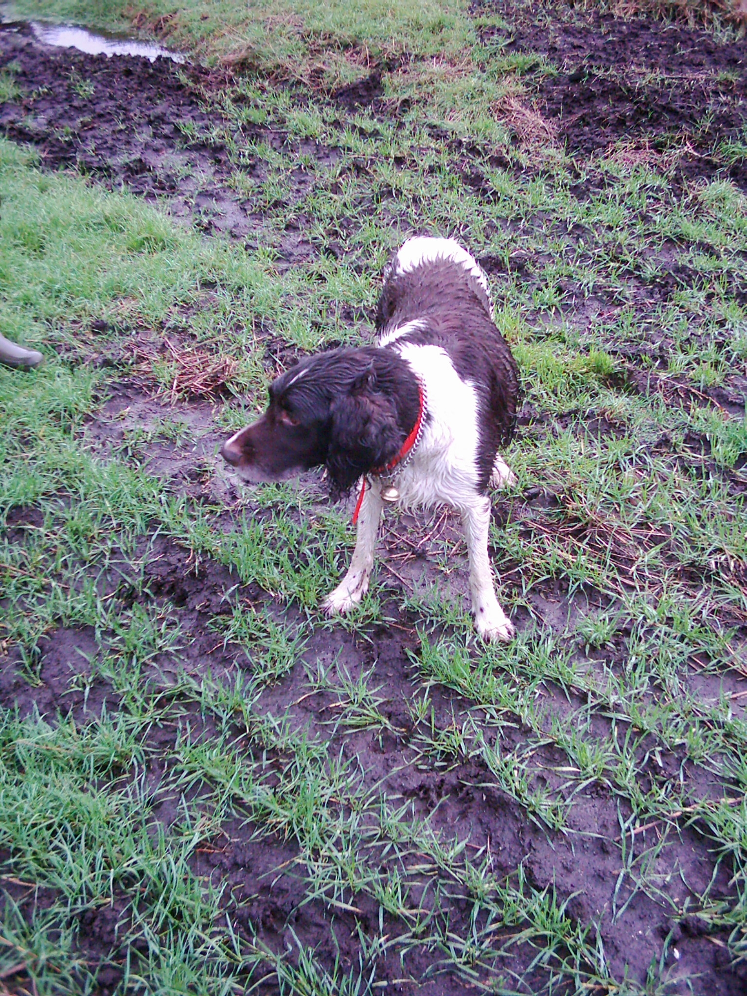 Kleiner Münsterländer